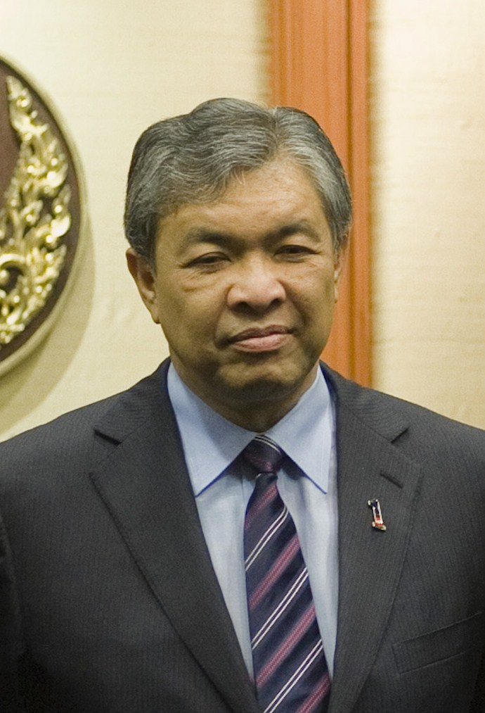 Dato' Sri Dr. Ahmad Zahid Hamidi รัฐมนตรีว่าการกระทรวงกลาโหมมาเลเซีย เข้าเยี่ยมคาราวะนายกรัฐมนตรี ณ ห้องรับรอง 2 อาคารรัฐสภา วันพฤหัสบดี ที่ 5 สิงหาคม พ.ศ.2553 (Photographer attached to the Prime Minister of the Kingdom of Thailand : Peerapat Wimolrungkarat / พีรพัฒน์ วิมลรังครัตน์)